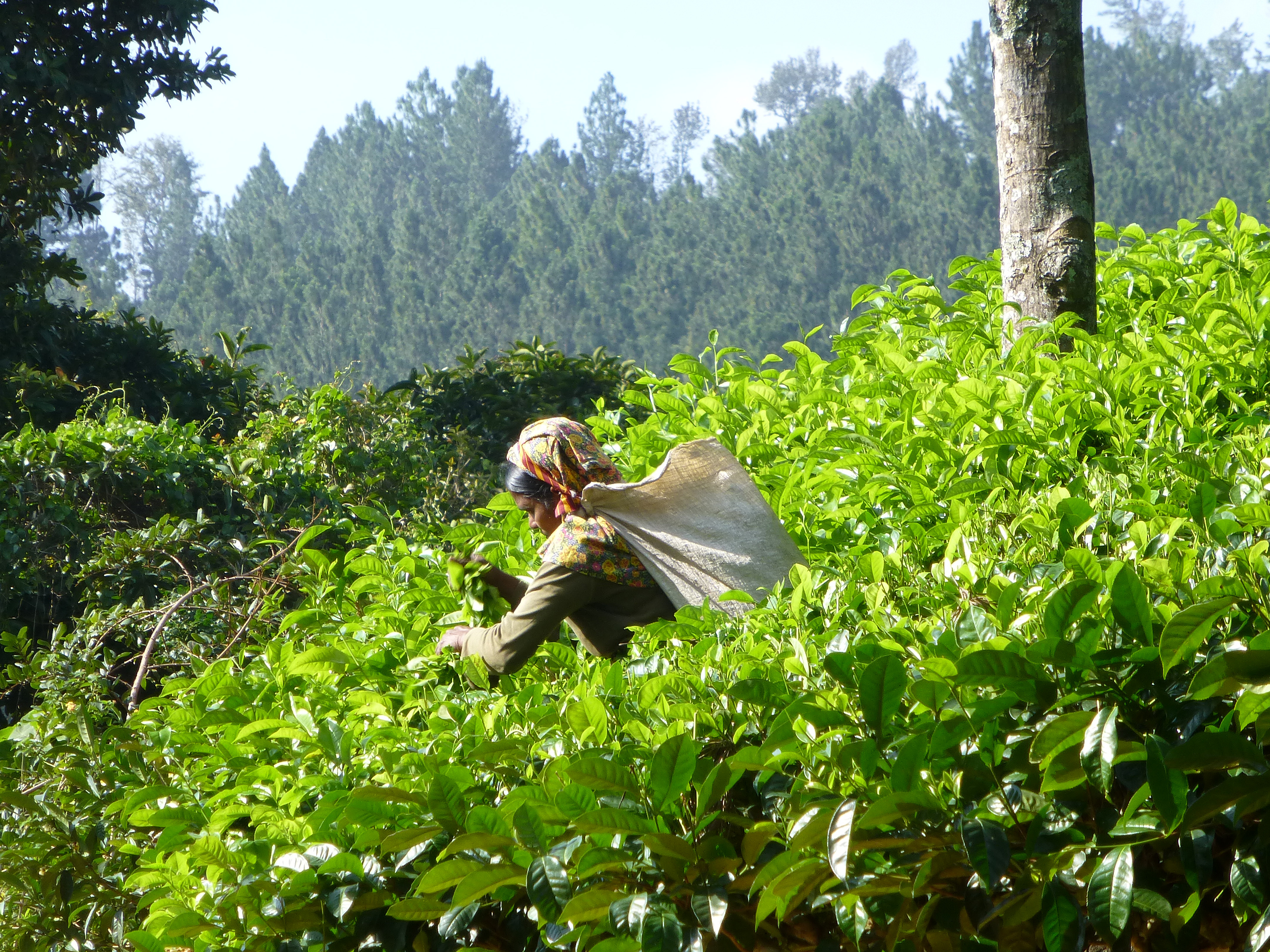 Sri Lanka, Province du Centre : cueilleuse de thé